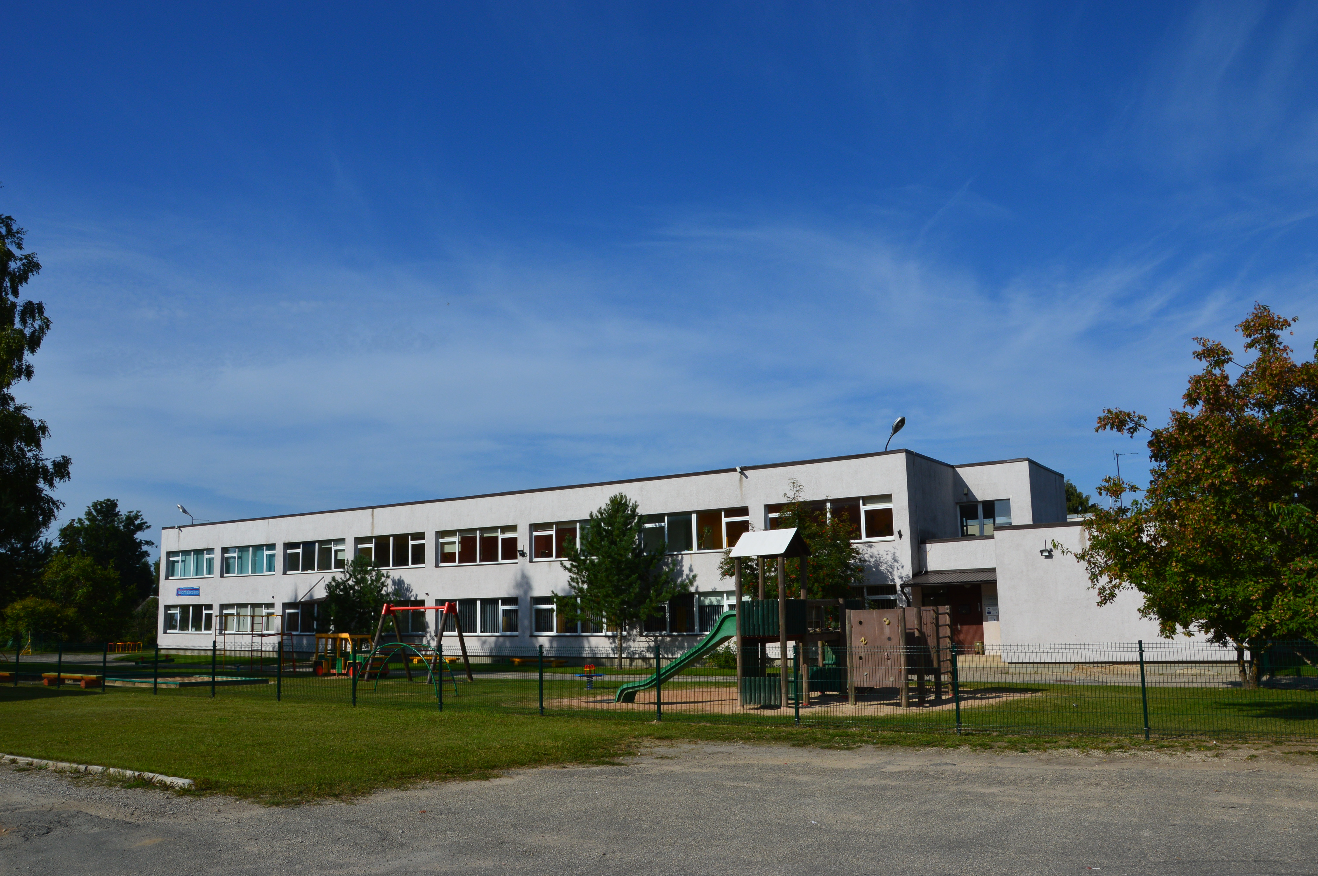 Kanepi lasteaed